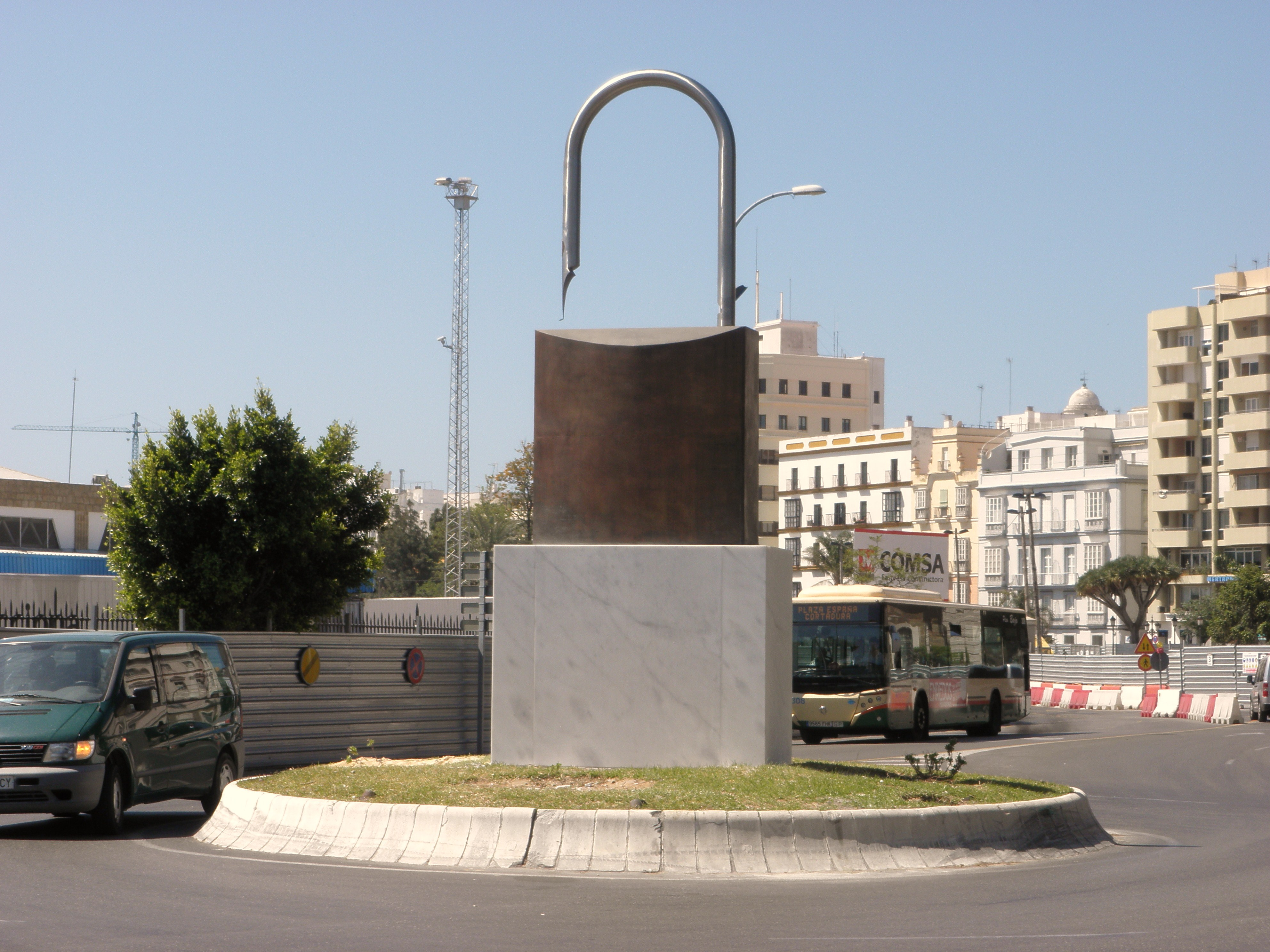 Glorieta con candado